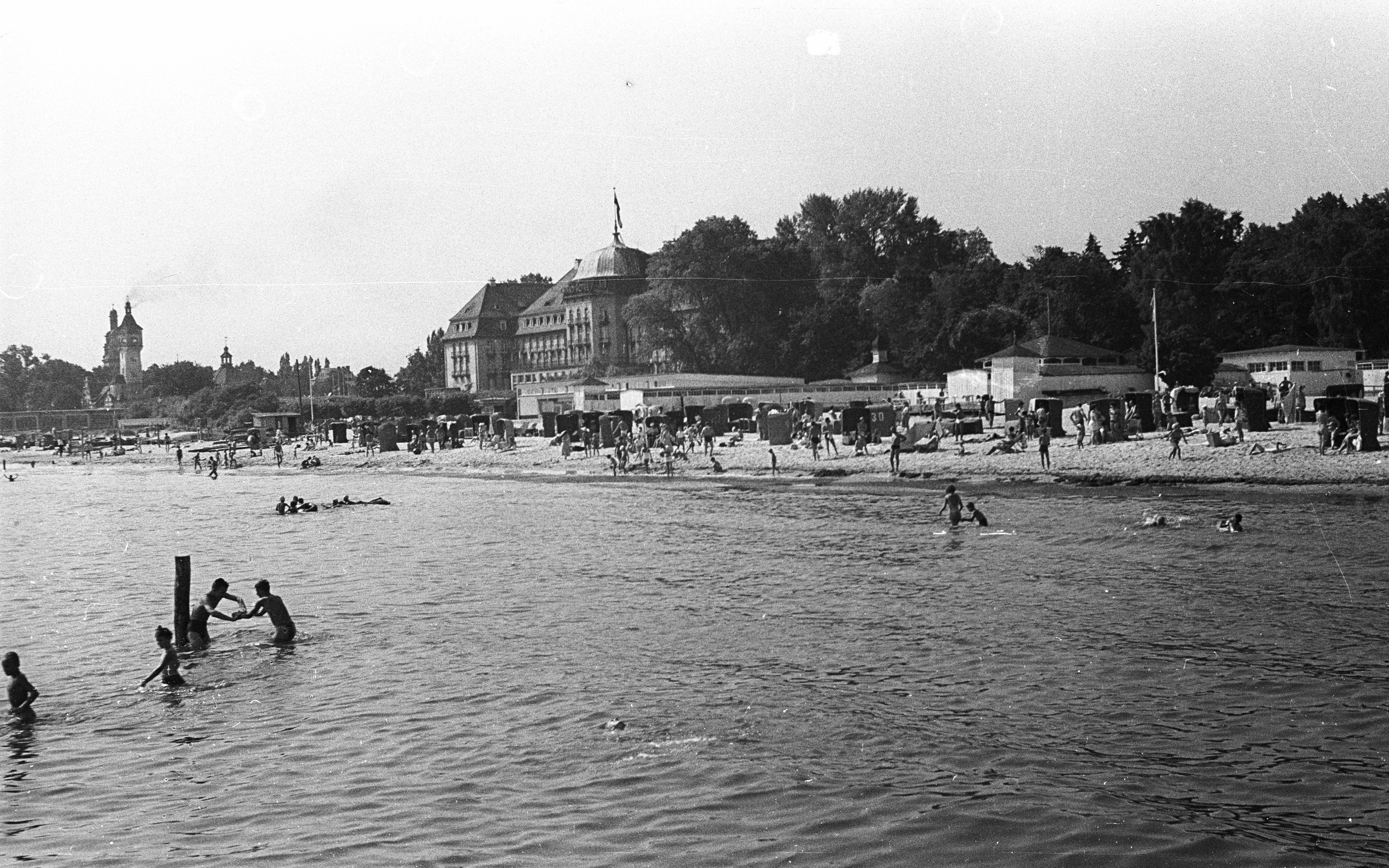 strand, középen a Grand Hotel. Location: Poland Title: strand, középen a Grand Hotel.